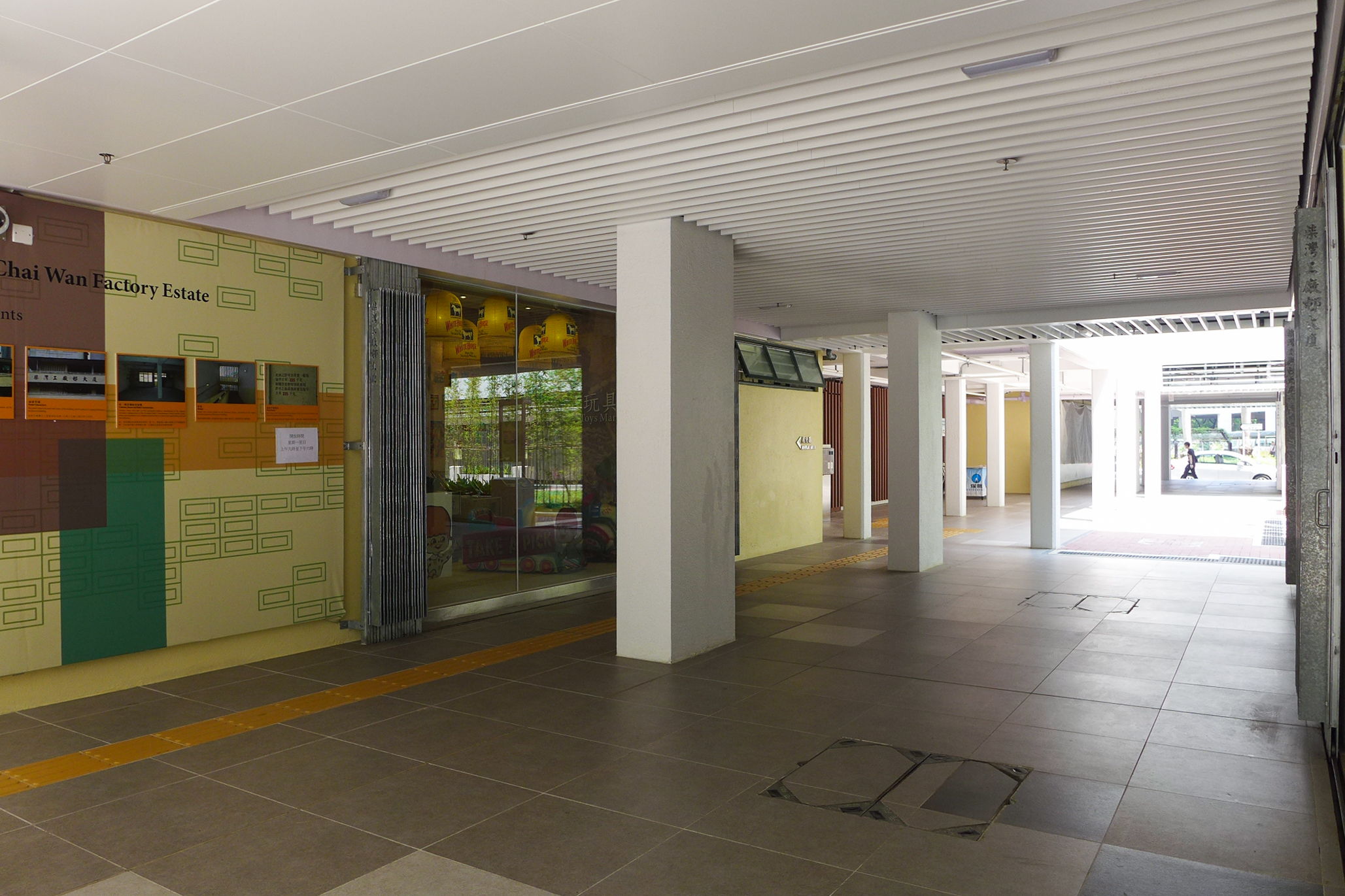 Wah Ha Estate